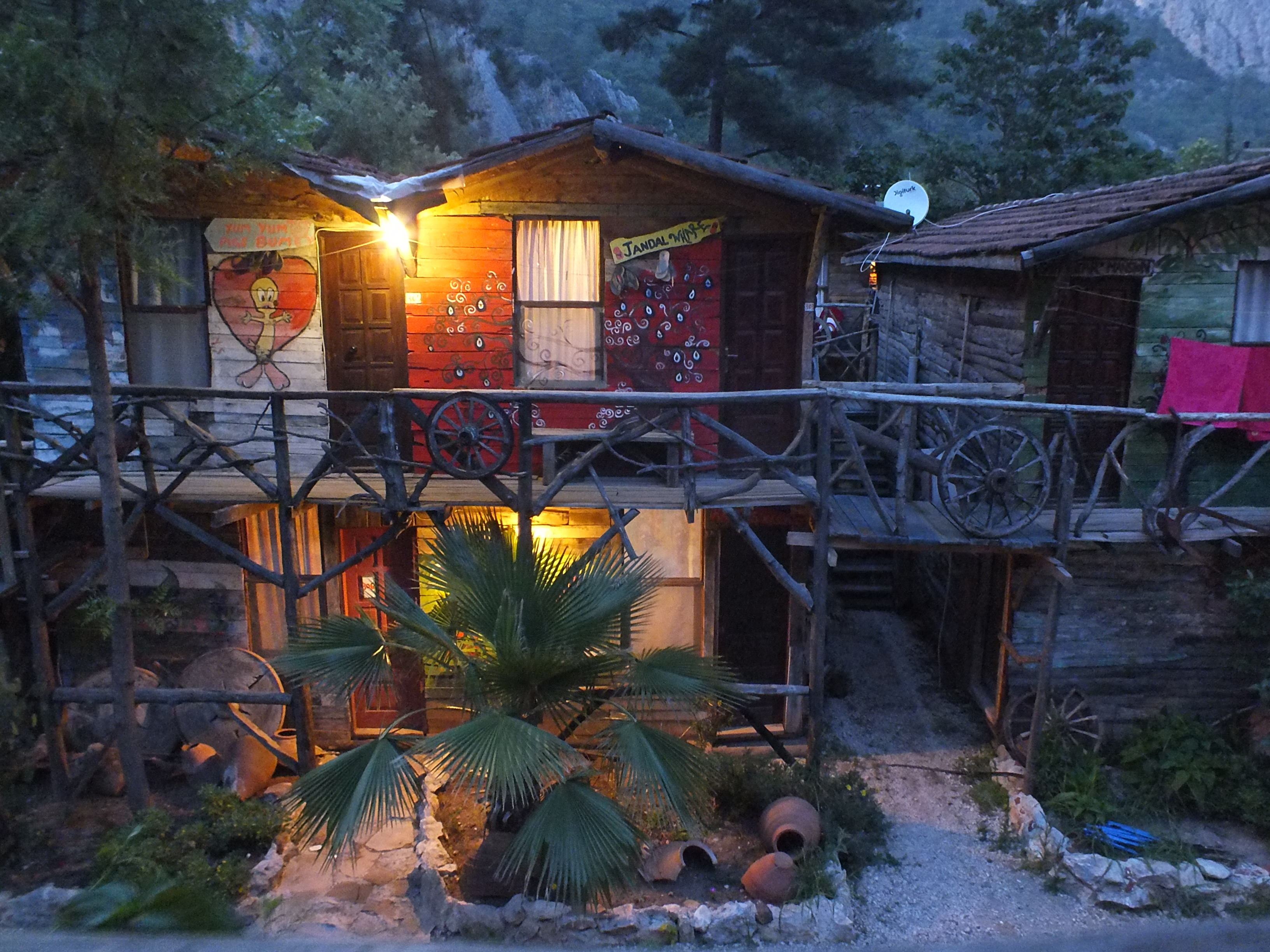 Olimpos antik kenti yakınlarında yer alan bungalov tarzı konaklama mekanı.